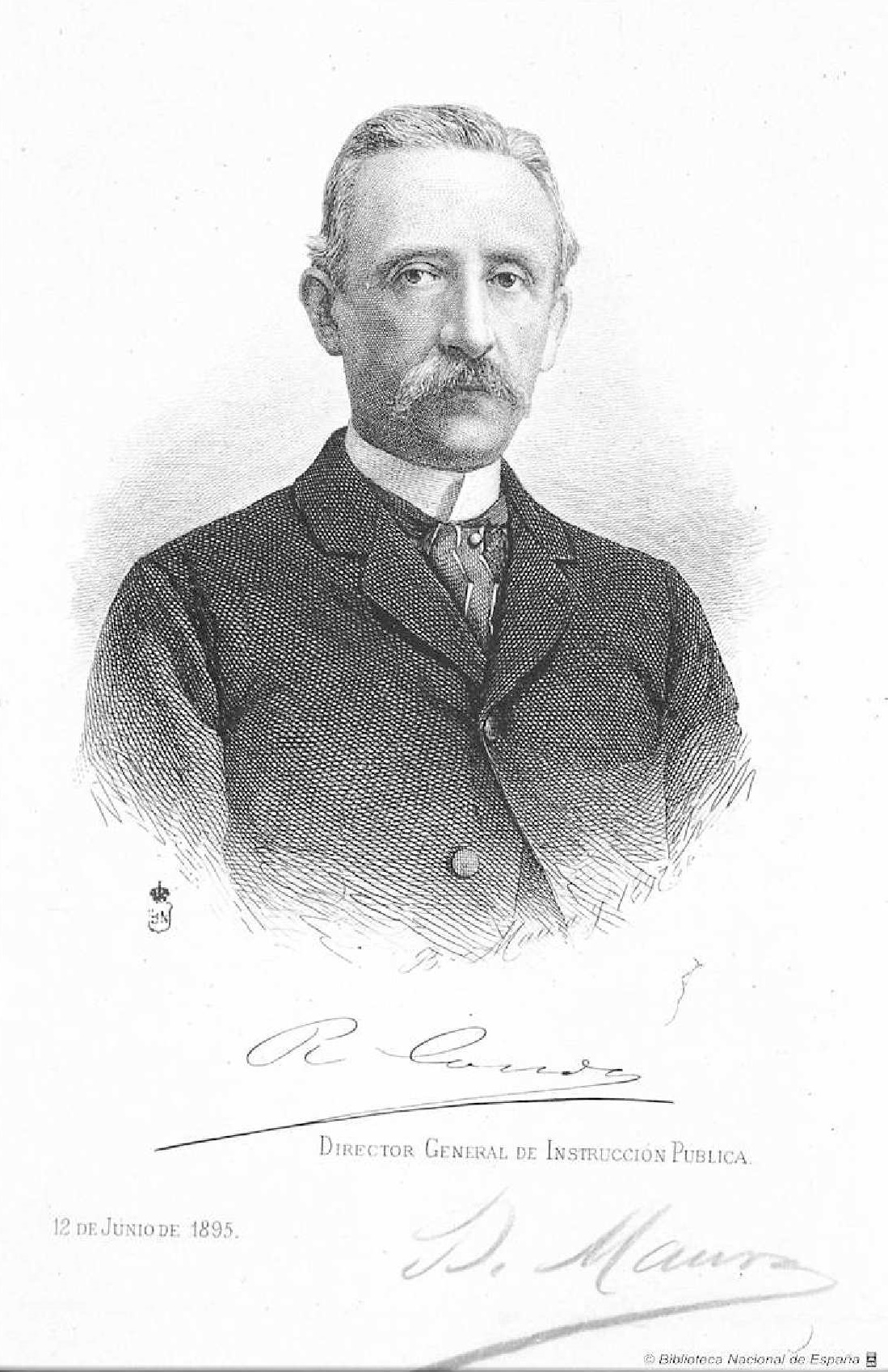 Retrato de Rafael Conde y Luque, director general de Instrucción Pública, Biblioteca Nacional de España